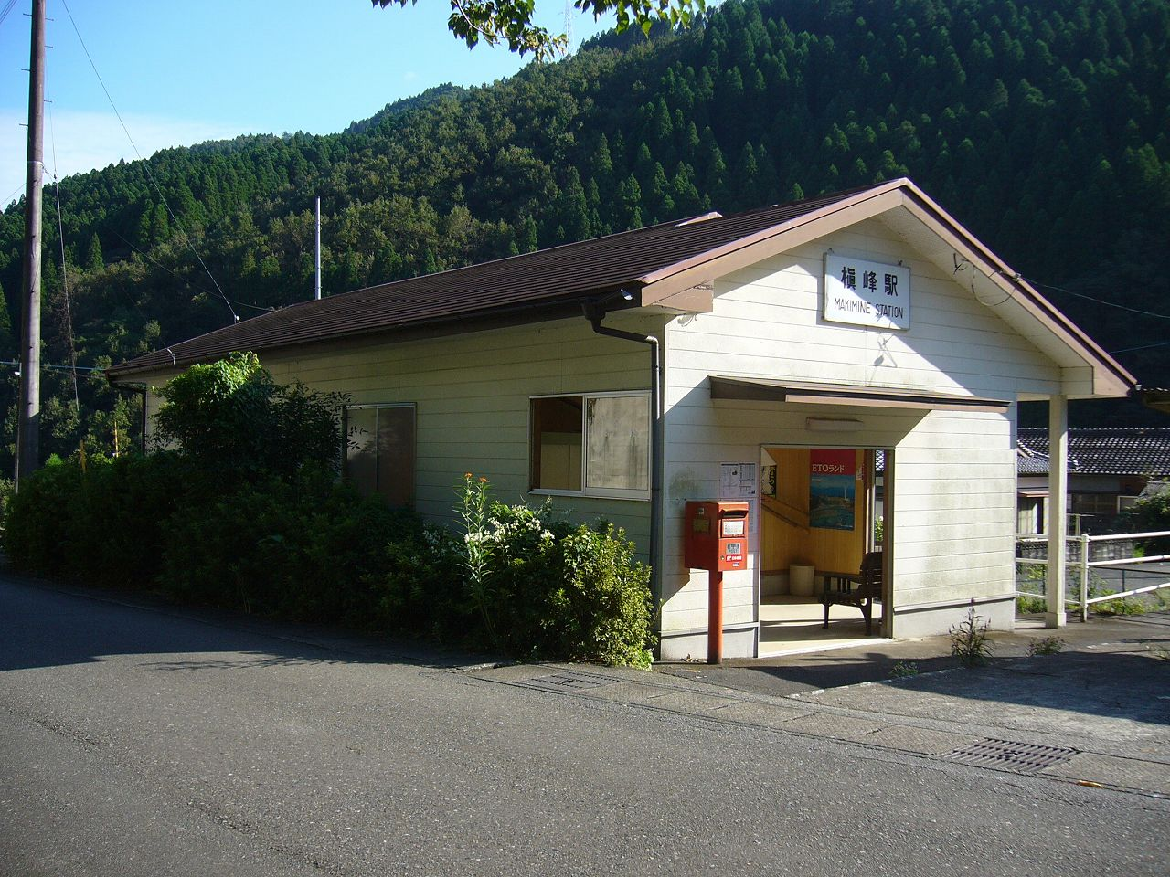 Makimine Station in Takachiho Line in Miyazaki, Japan